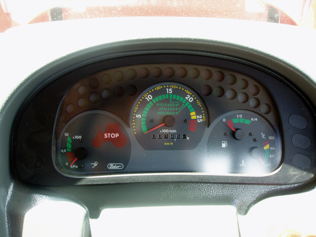 Wyświetlacz ciągnika Zetor.